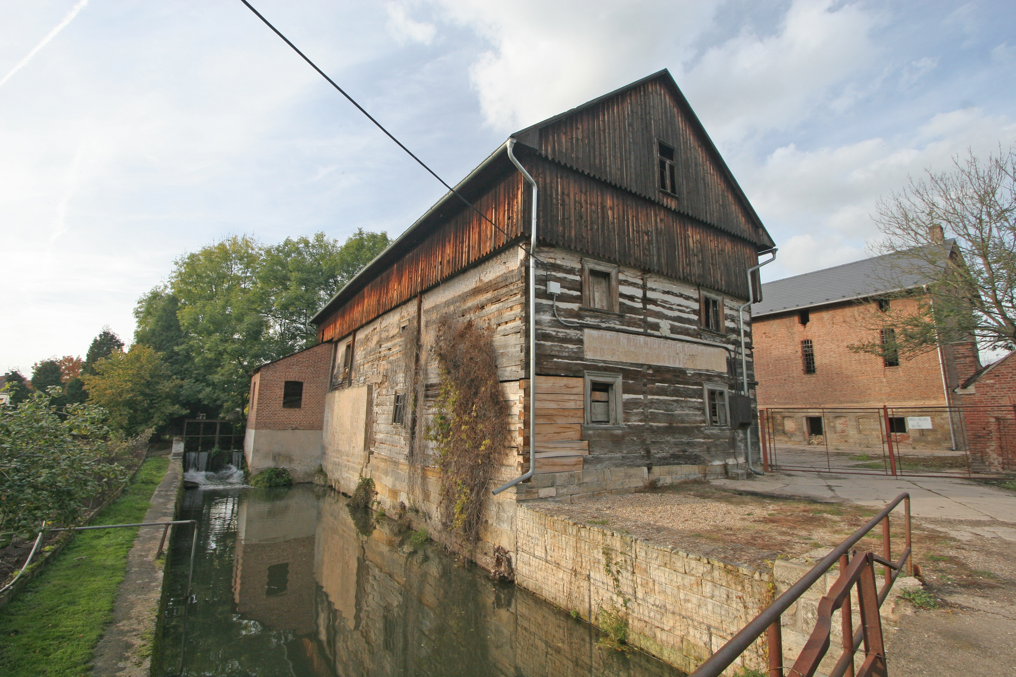 Vodní mlýn - areál (mlýn, sušárna obilí a čekanky, stodola, náhon) (Boharyně), V okraj obce 1, Boharyně